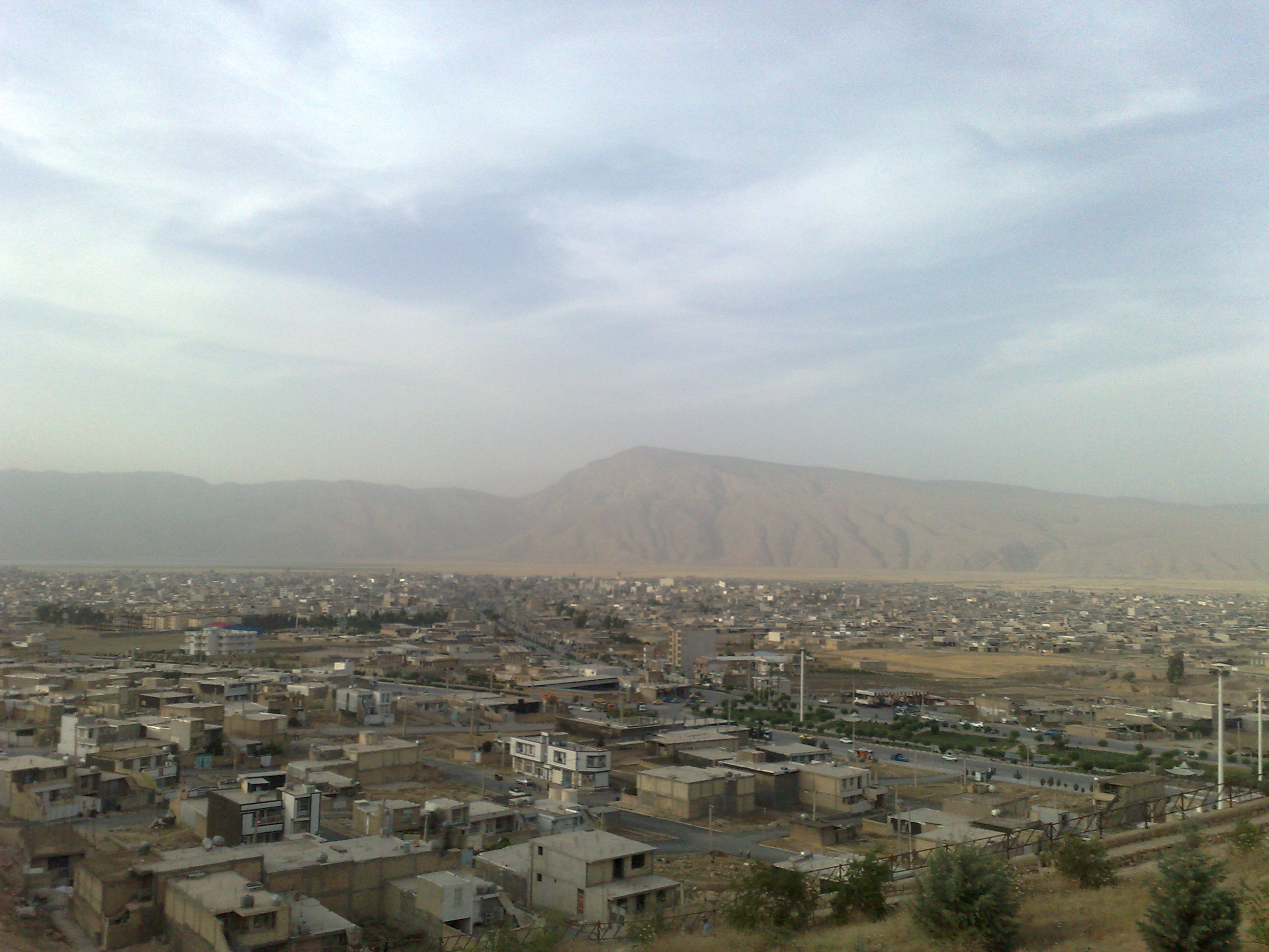 Homes